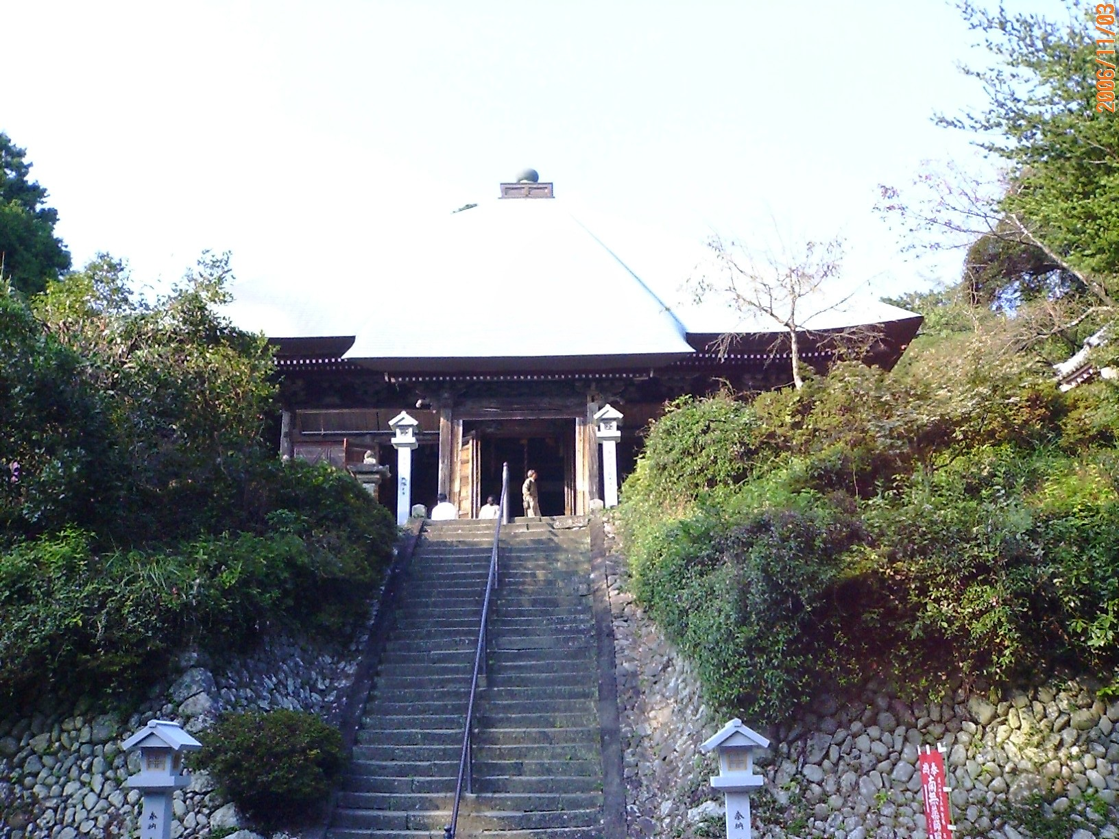 医王山油山寺（静岡県袋井市）本堂,2006年11月,撮影:投稿者